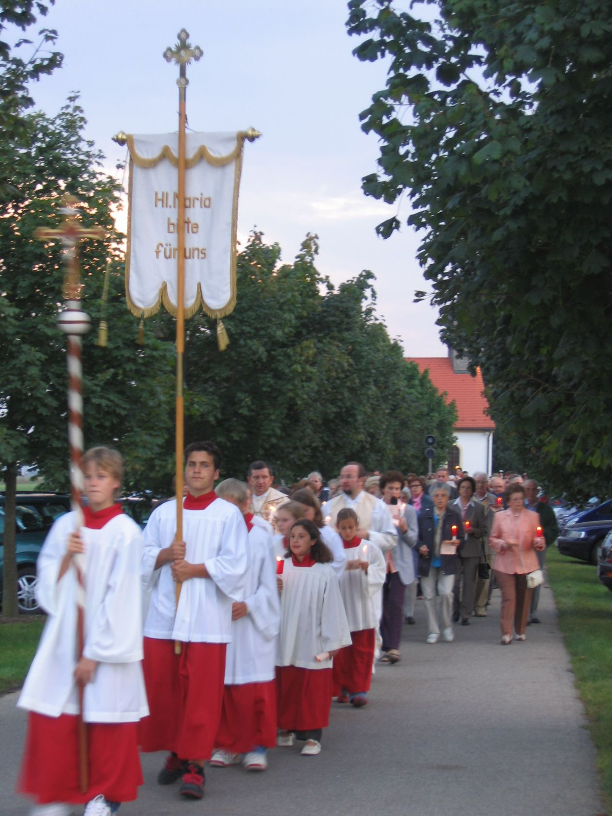 Lichterprozession an der Kahlhofkapelle